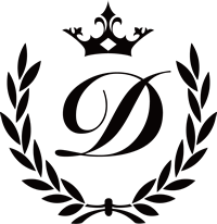 2017年度採用新制服デザインのエンブレム「Dクラウン」。 互いの個性を尊重しあいながら、高みを目指そうとする本校の姿勢からデザインした。 ジャケットエンブレム、ジャケットボタン、リボン、ネクタイ、長袖シャツ、半袖シャツに使用予定。